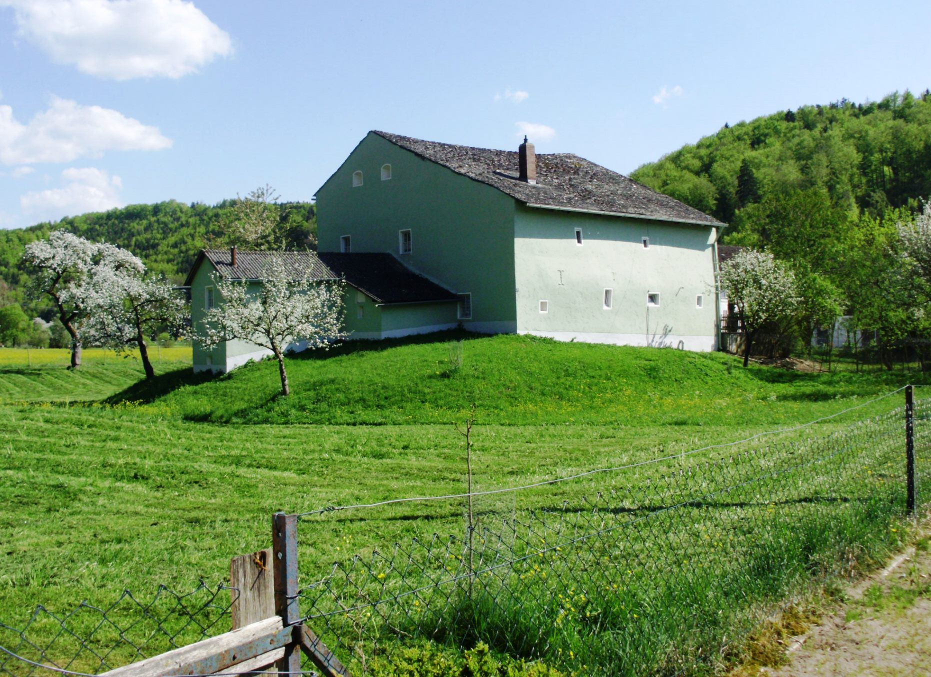 Eibwang (Ortsteil von Kinding imLandkreis Eichstätt), Festes Haus, Nordwestansicht